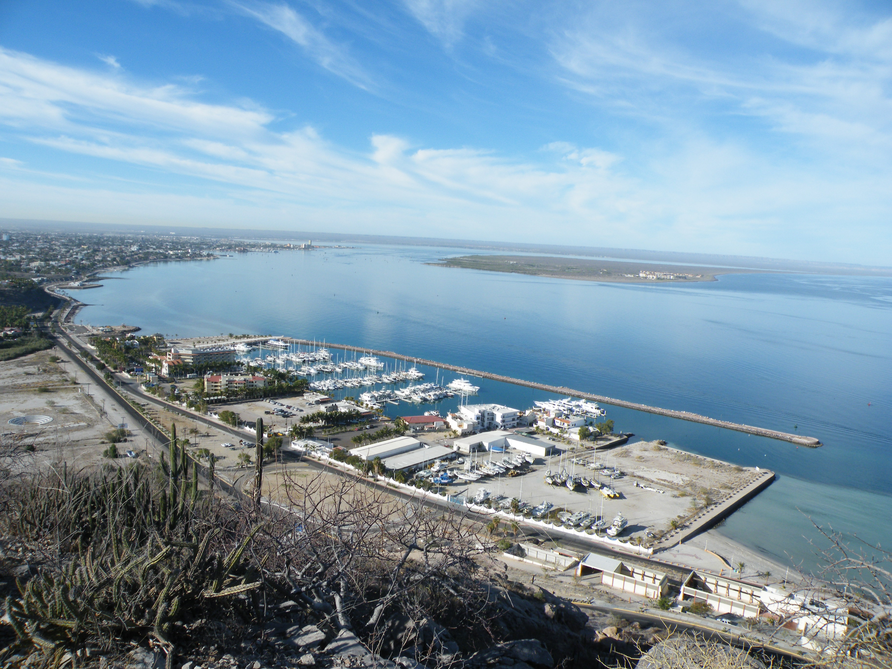 La Paz, Baja California Sur